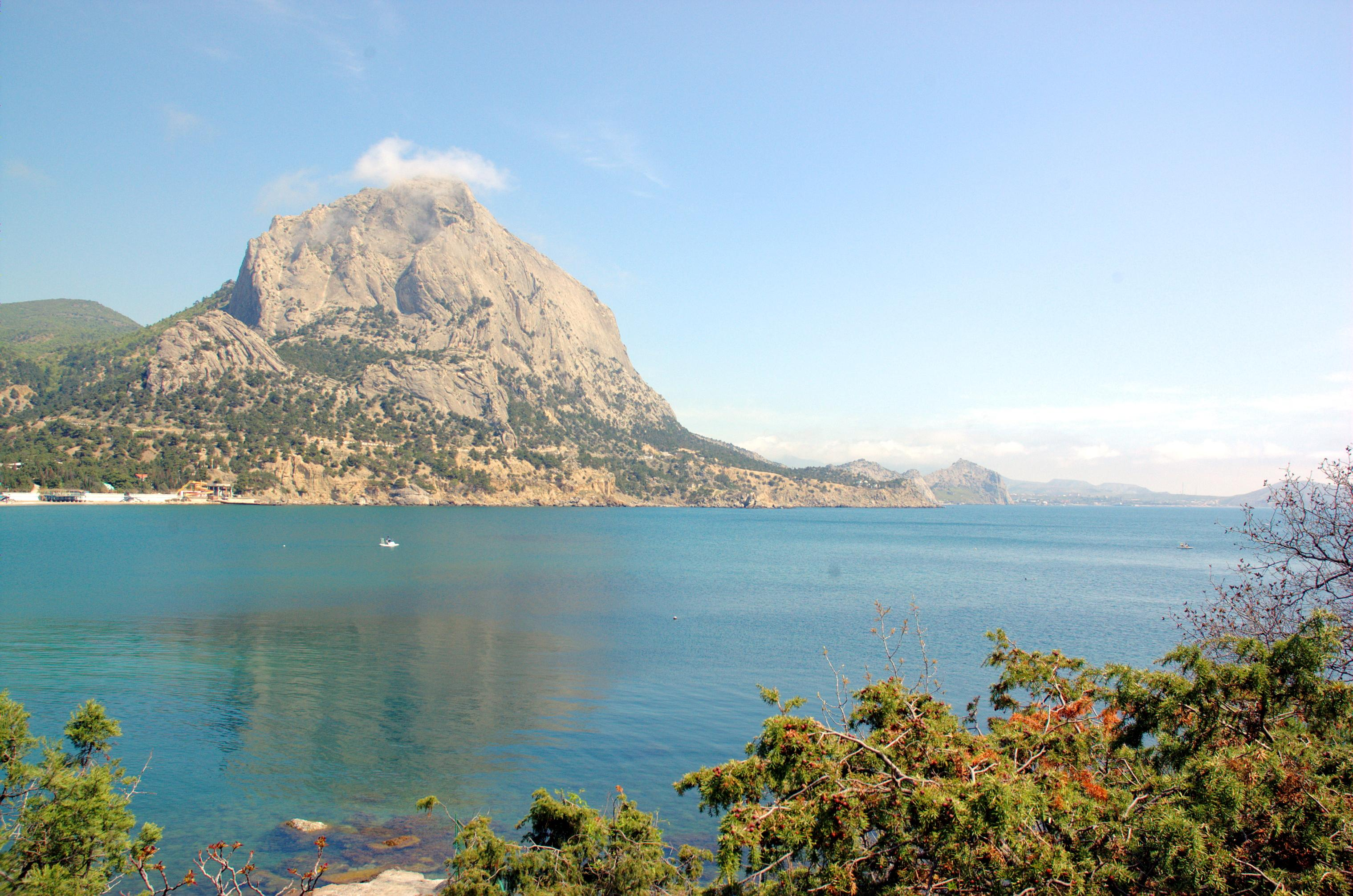 Вид на гору Сокол со стороны Голицынской тропы и бухты Нового света (Судак).